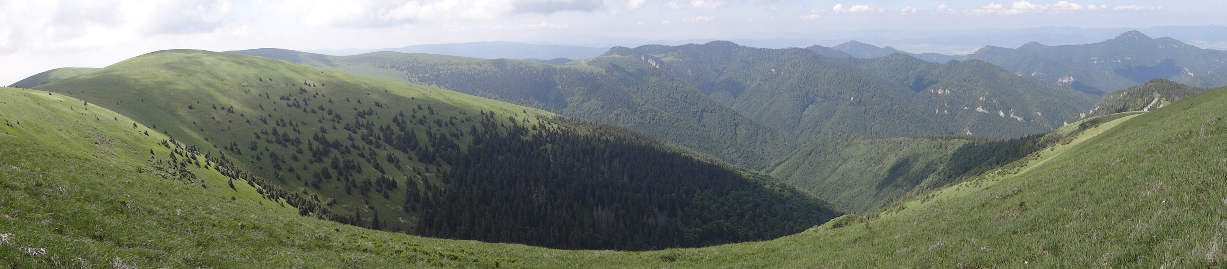 Dedošová dolina